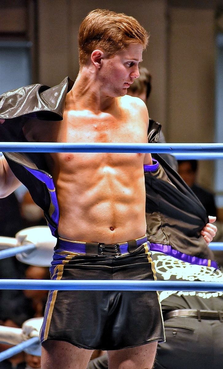 プロレスラーのフランシスコ・アキラ選手